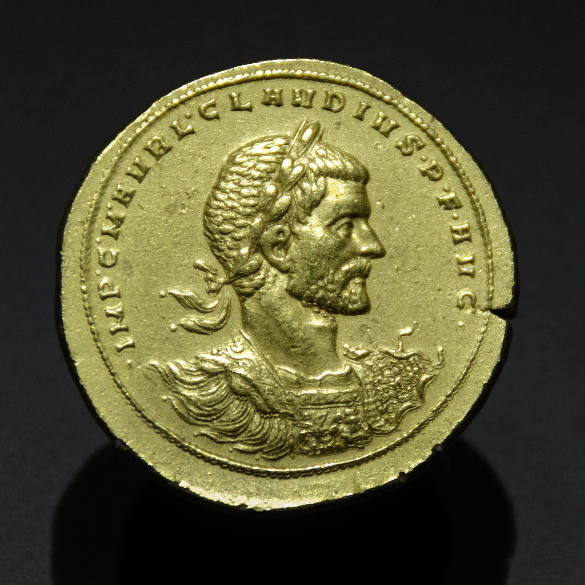 Moneda de ocho áureos de Claudio II, el Gótico, emperador del imperio romano en el siglo III d.C. Un áureo equivalía a 25 denarios de plata. Expuesta en una vitrina del Museo Arqueológico Nacional. Atelier Milan, an 268, 38,83 g. n°71 du trésor de Lava. Numismatica Ars Classica, Zurich, n°201, vente du 22 décembre 2002 (80.000 CHF).